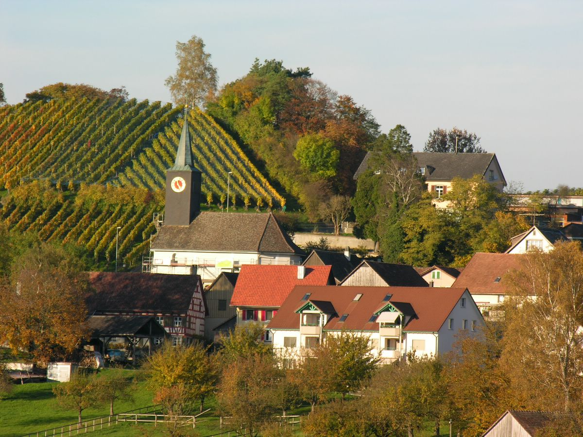 Dörflingen